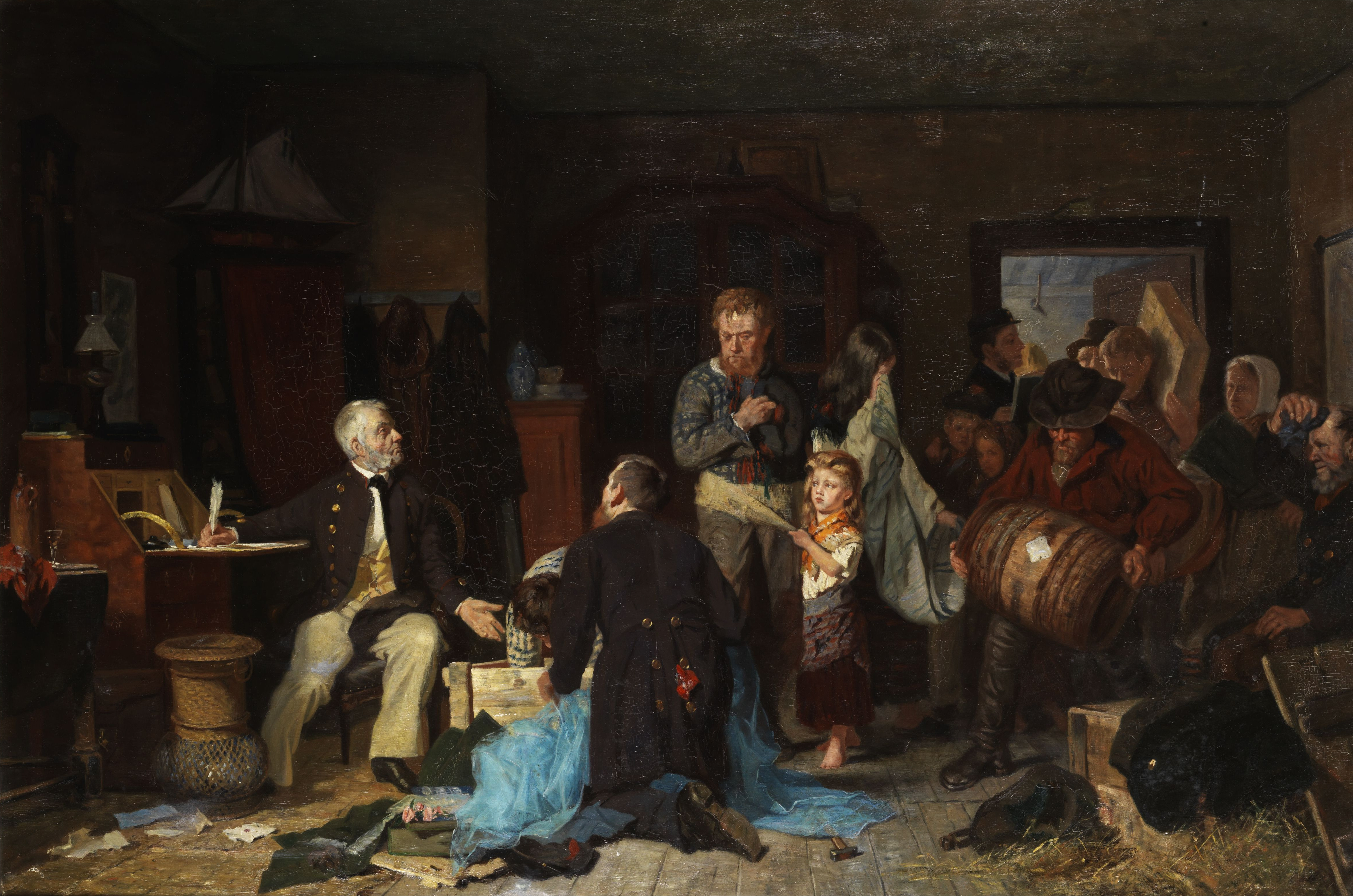 Die Hausratsauflösung. Skandinavien, 19. Jahrhundert. Öl auf Leinwand. 93 x 139,5 cm.